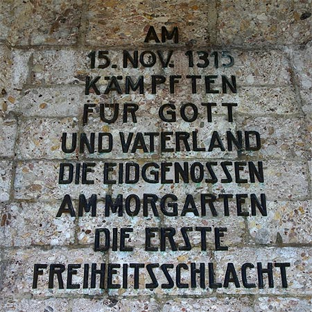 Schlachtdenkmal in Morgarten (Nr. 03.1-4565)